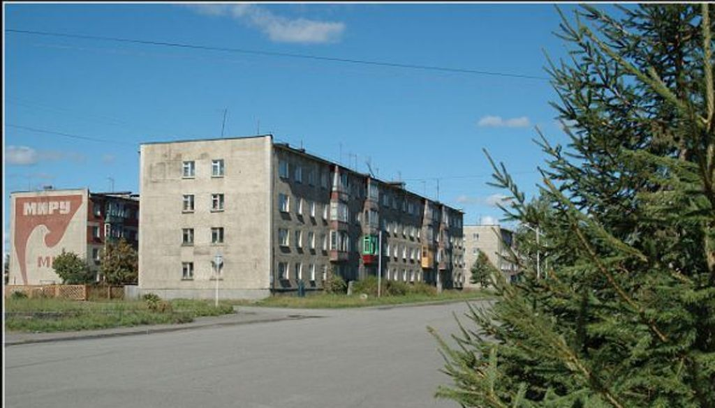 мильково